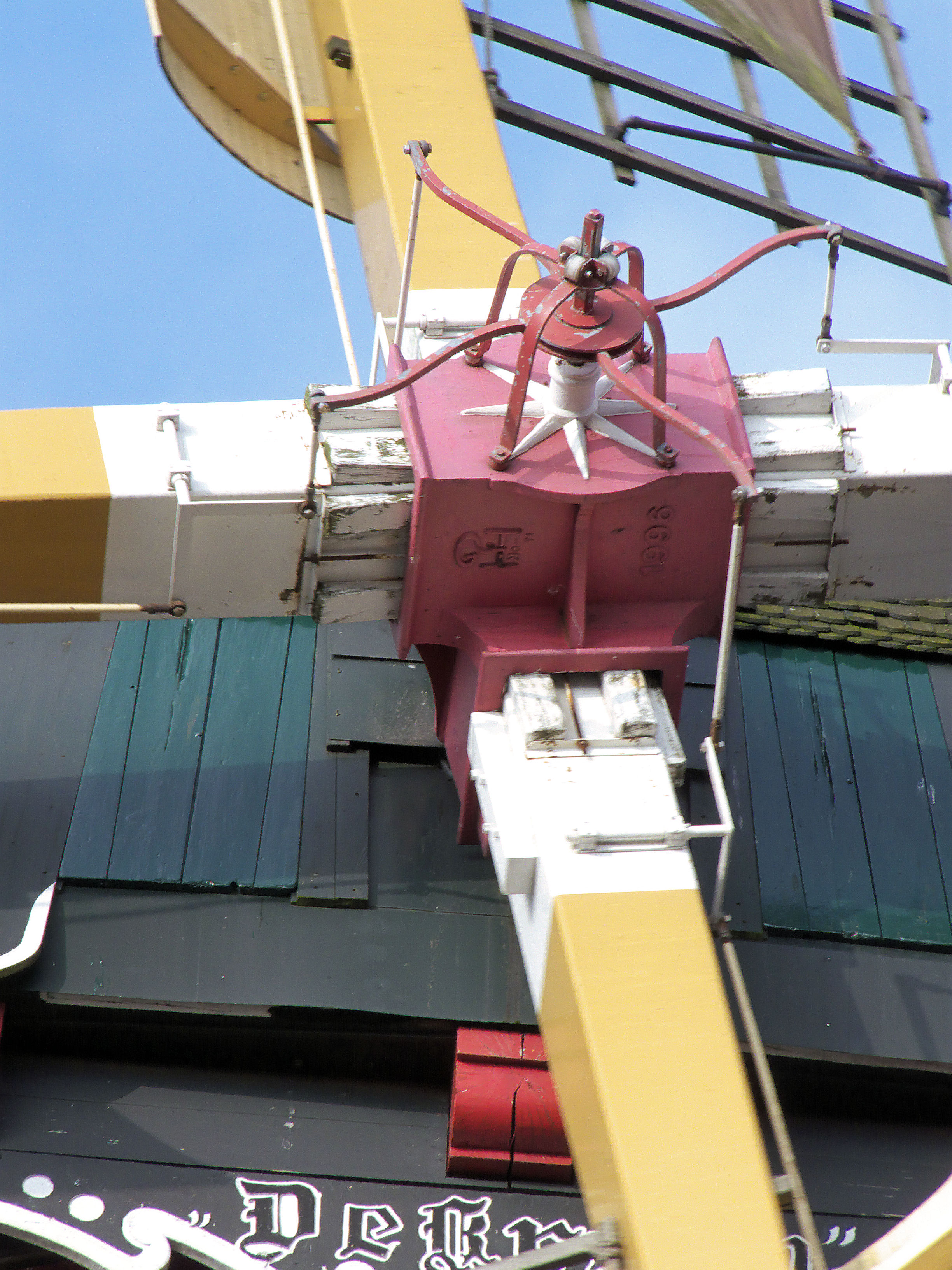 Molen De Kroon Arnhem askop met spin